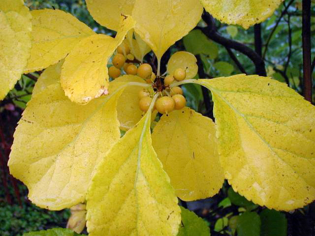 Celastrus orbiculatus